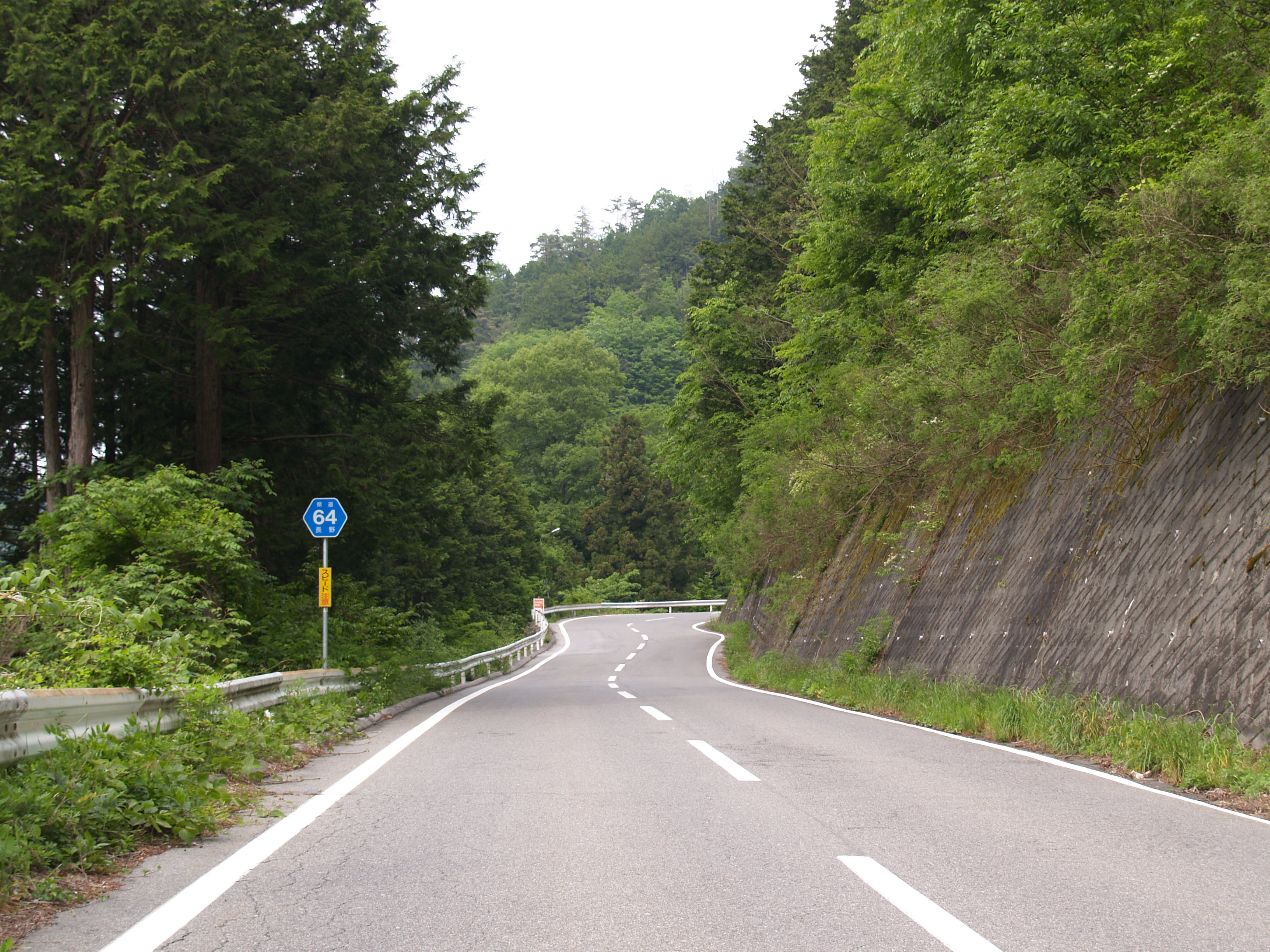 長野県道64号天竜公園阿智線（泰阜村、唐笠駅近くにて）